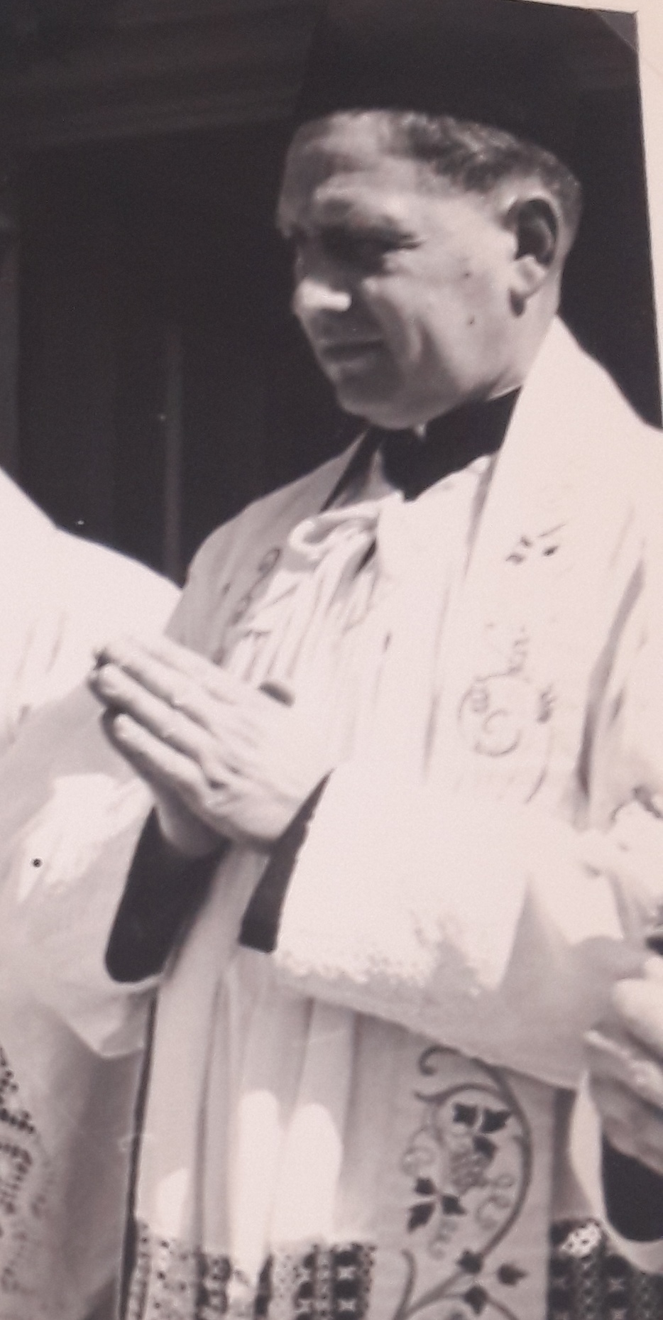 P. Kuno Zerlauth SJ (1911-2006) bei einer Primiz 1956 in Steyr